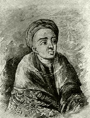 A Dietrichstein lakodalmát ábrázoló festménynek a gráczi történeti múzeumban őrzött egykorú másolata után